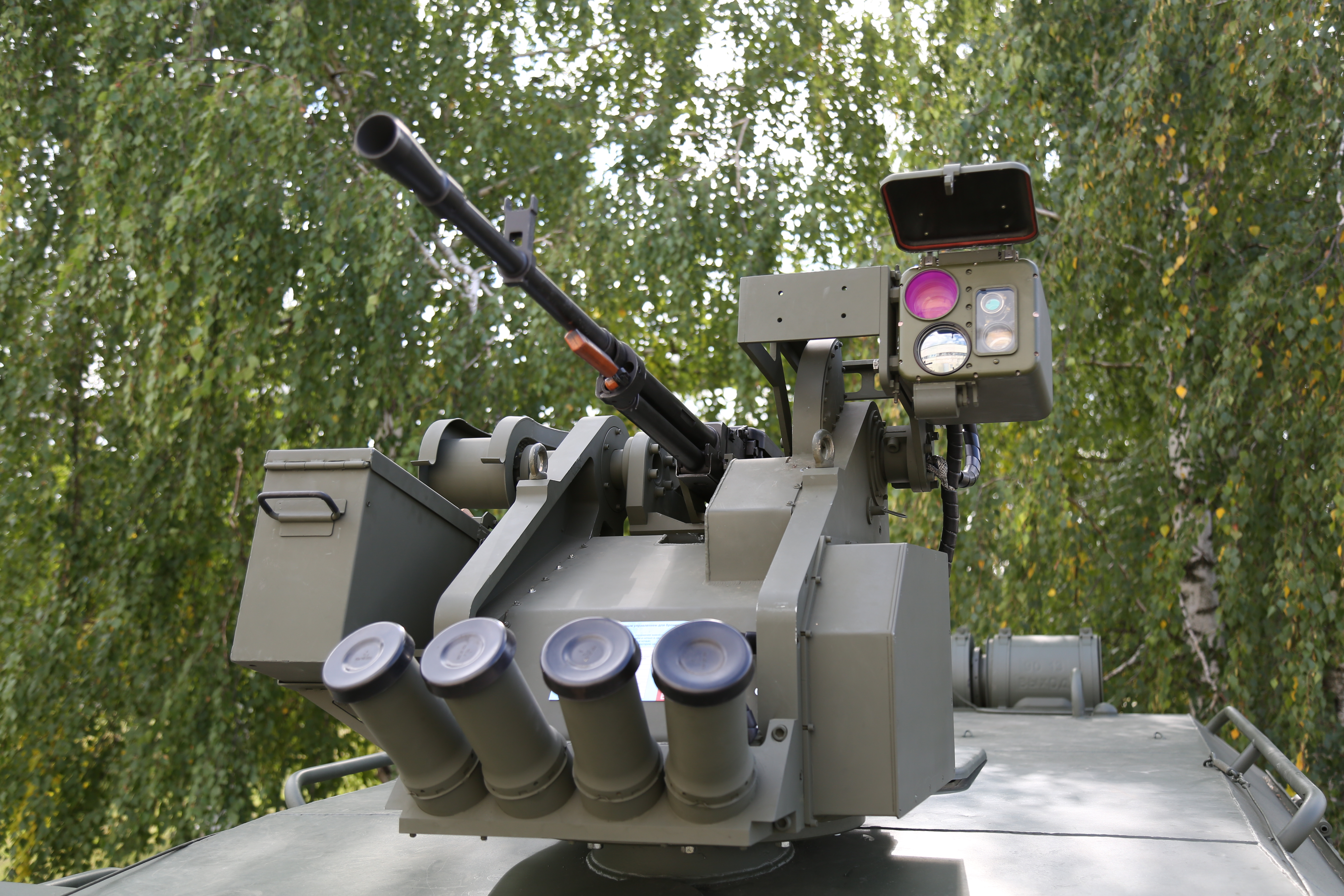 БМДУ "Арбалет-ДМ"